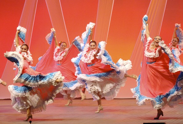 Spectacle au festival de Confolens.